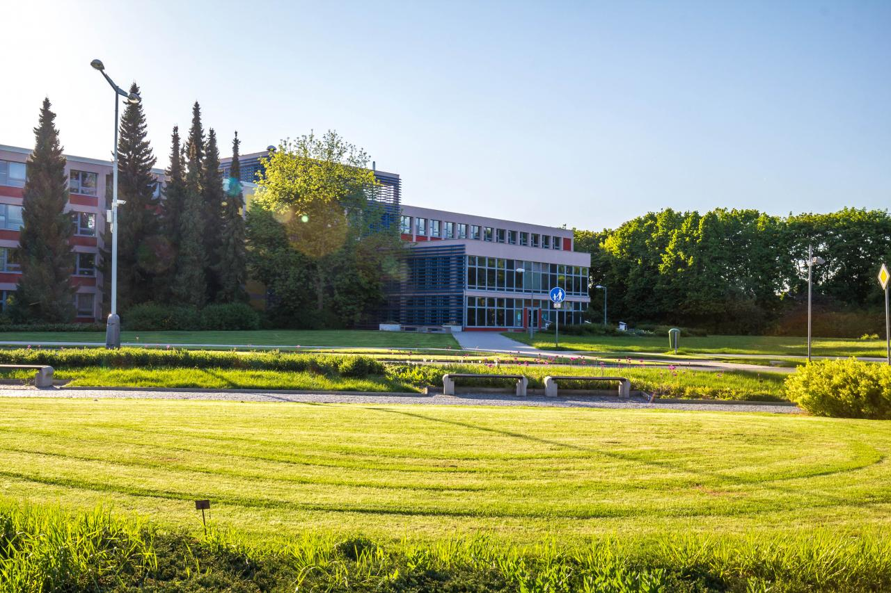 Provozně ekonomická fakulta